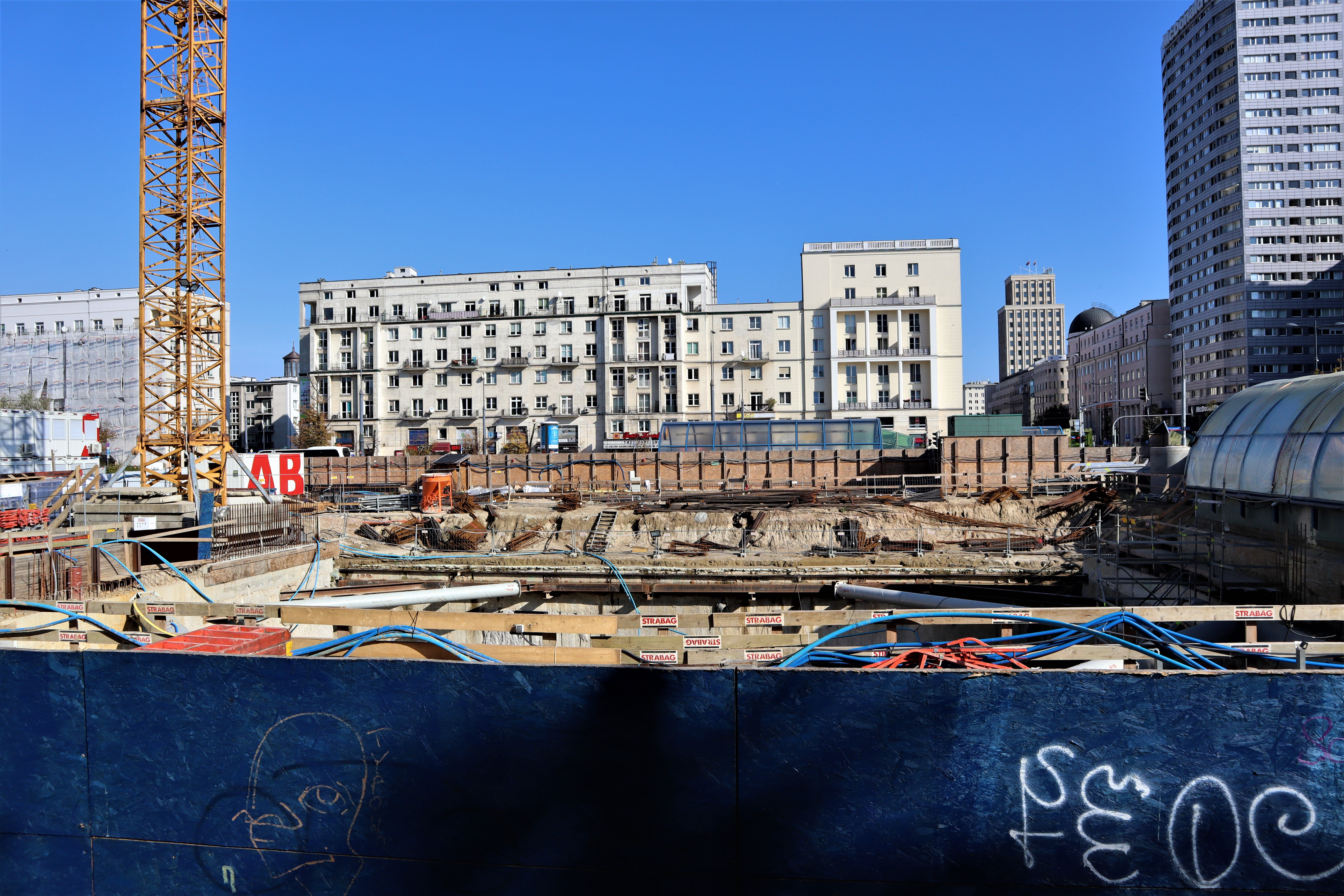 Central Point, Warschau